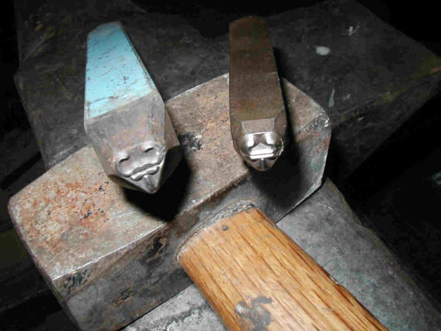 Zwei Schmiedemarken mit Hammer